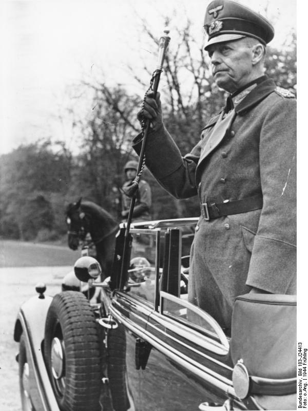 Gerd v. Rundstedt Gerd von Rundstedt [Frühjahr 1944] [Gerd von Rundstedt in Auto stehend, mit Stab grüßend (Abnahme einer Parade ?)] Abgebildete Personen: Rundstedt, Gerd von: Generalfeldmarschall, Ritterkreuz (RK), Heer, Deutschland (GND 118939327)